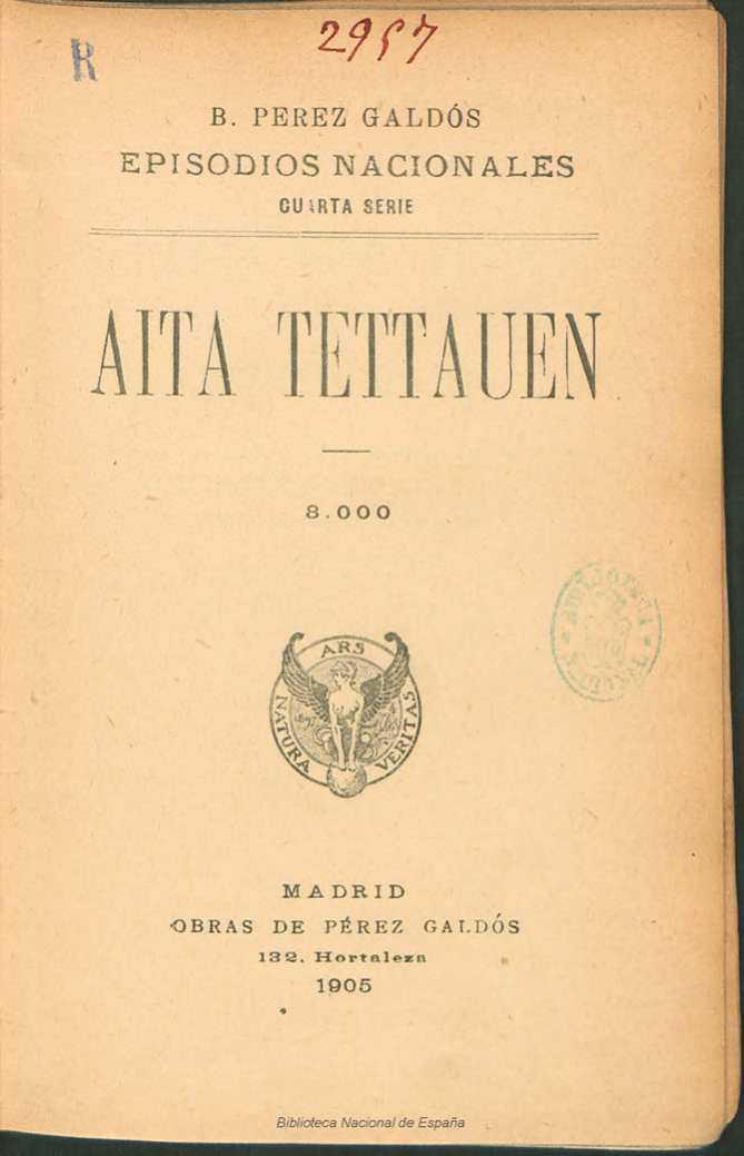 Aita Tettauen ; B. Pérez Galdós Autor: Pérez Galdós, Benito (1843-1920) Fecha: 1905 Datos de edición: Madrid, Obras de Pérez Galdós